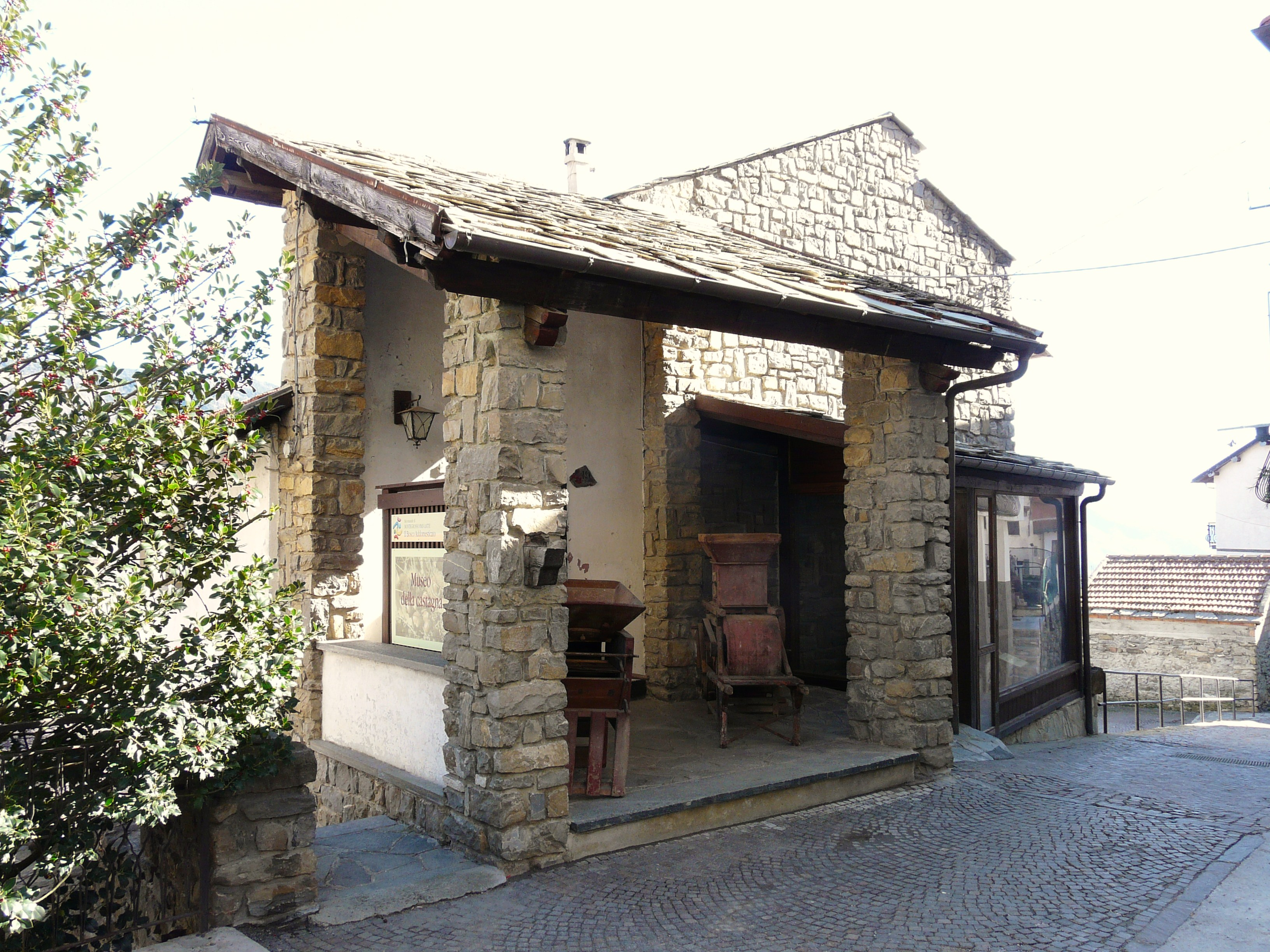 Museo della Castagna, Montegrosso Pian Latte, Liguria, Italia